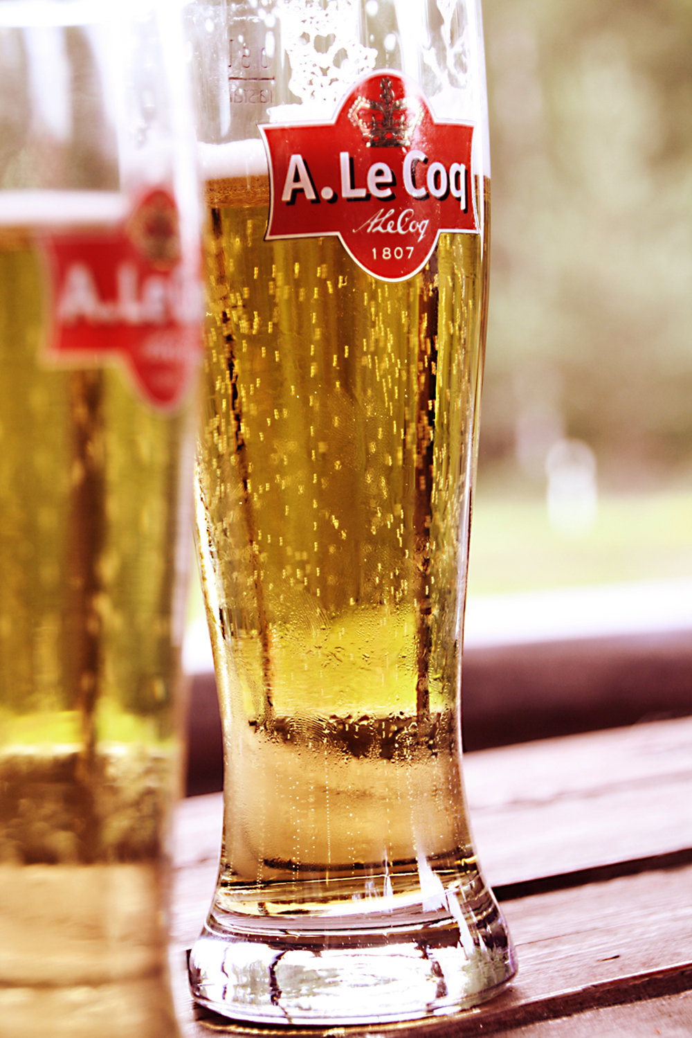 A. Le. Coq. vaadiõlu